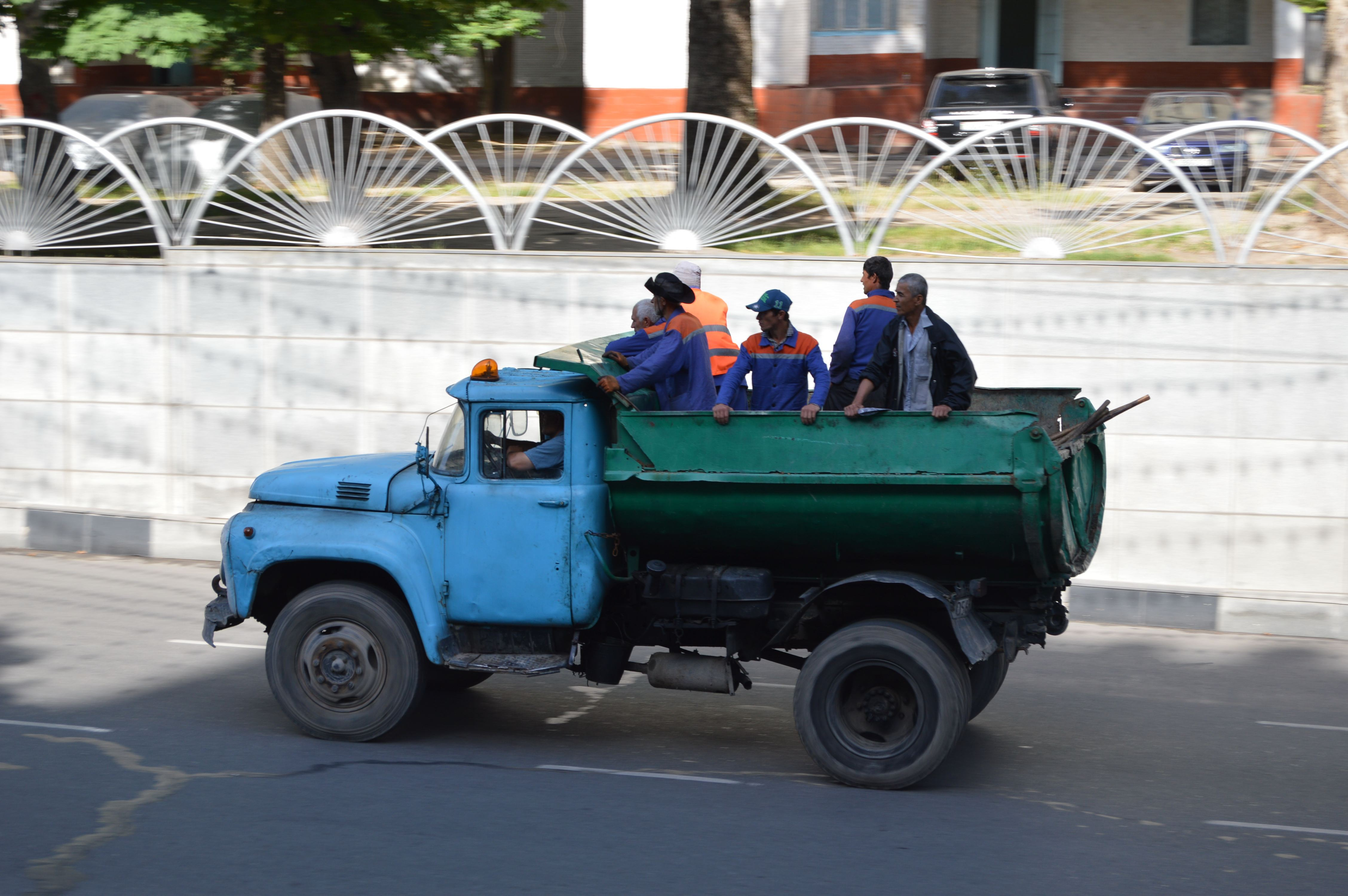 Дорожные рабочие в Душанбе едут в кузове грузовика.